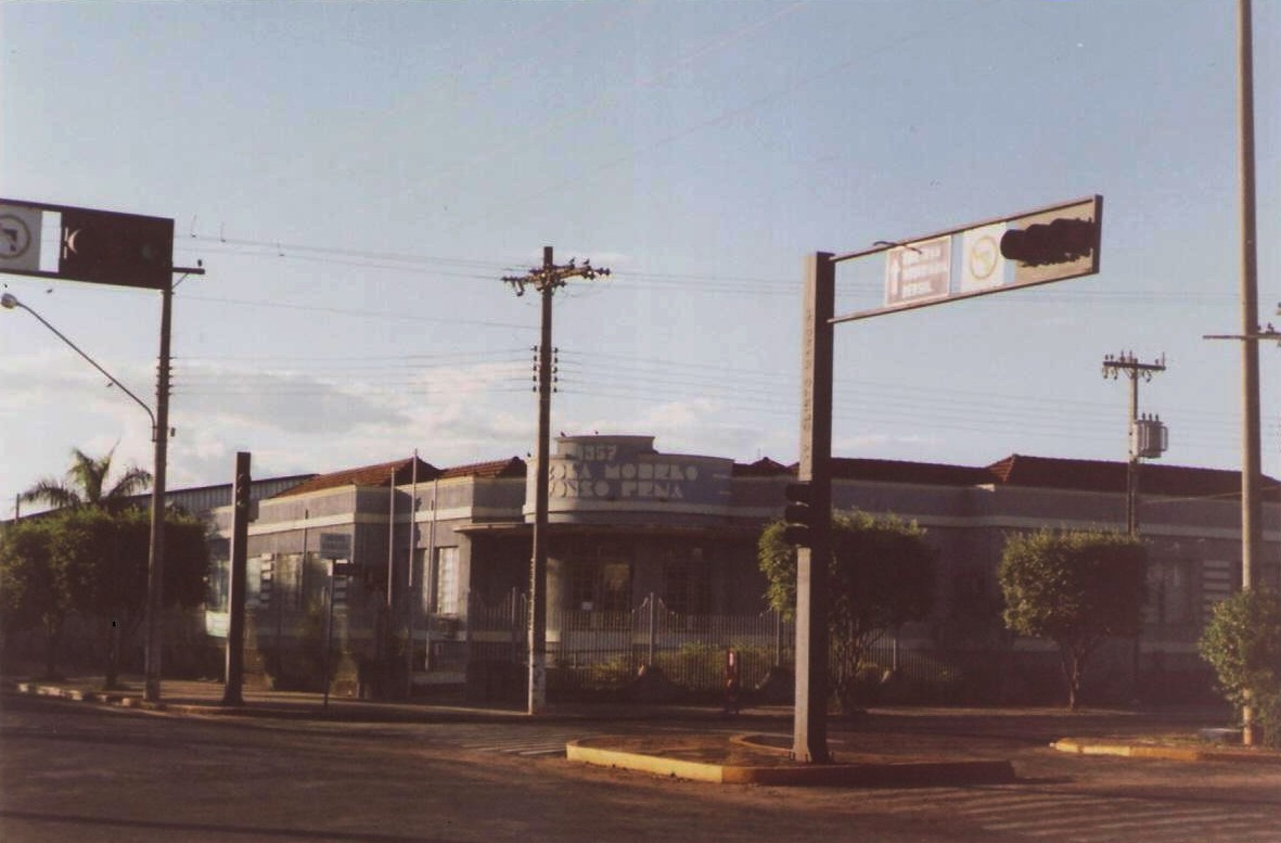 Descrição: Escola Afonso Pena, exemplo da arquitetura de Três Lagoas, Mato Grosso do Sul, Brasil. 2007.